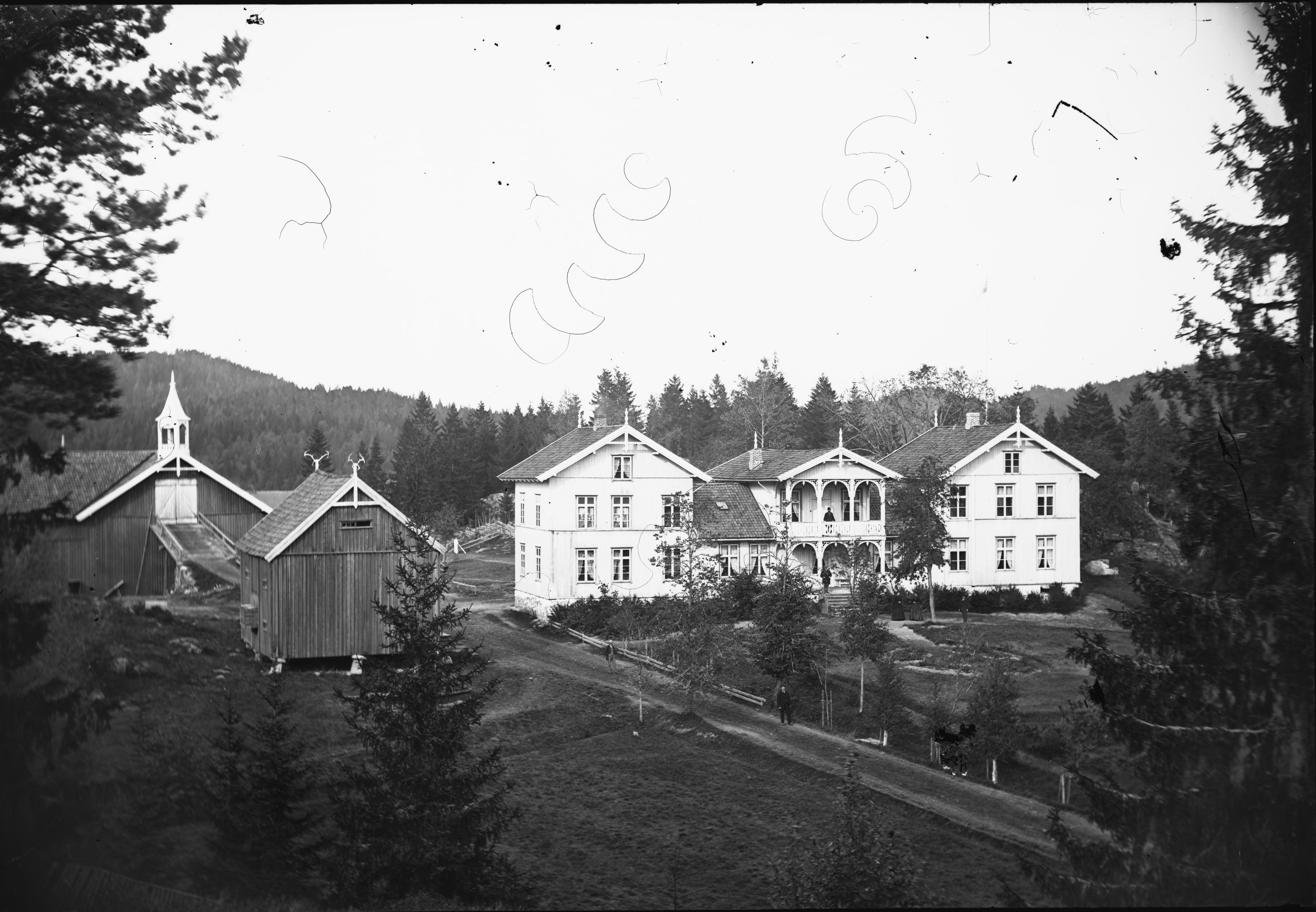 Sted: Losby Kommune: Lørenskog Fylke: Akershus Tagger